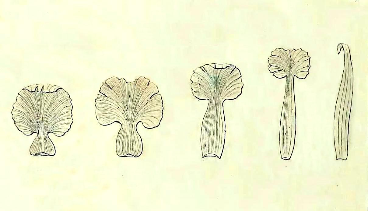 Rhaponticum canariense (como Serratula canariensis) - Serie de brácteas involucrales (de exterior (izda) hasta interior (dcha)) en Histoire Naturelle des Îles Canaries, 1846